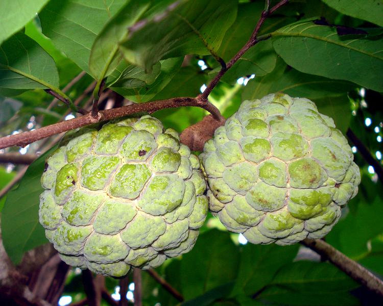 സീതാപഴം Name : Anona squamosa fruit Family : Annonaceae